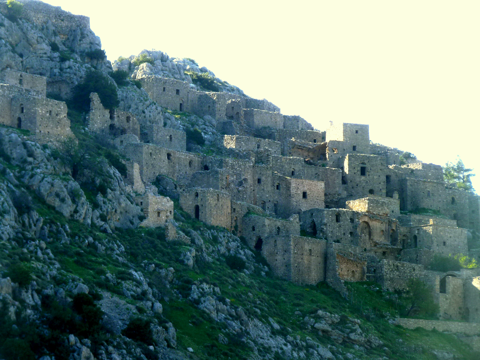 Ανάβατος